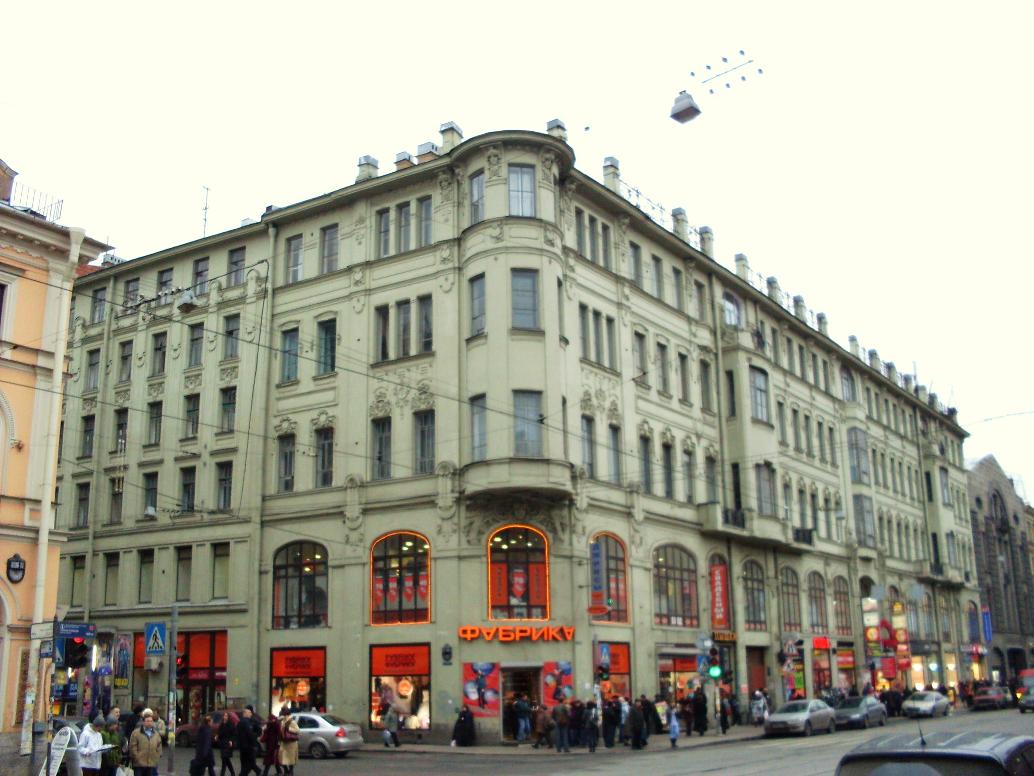 Доходный дом Томилина, ул. Садовая, 32, Санкт-Петербург